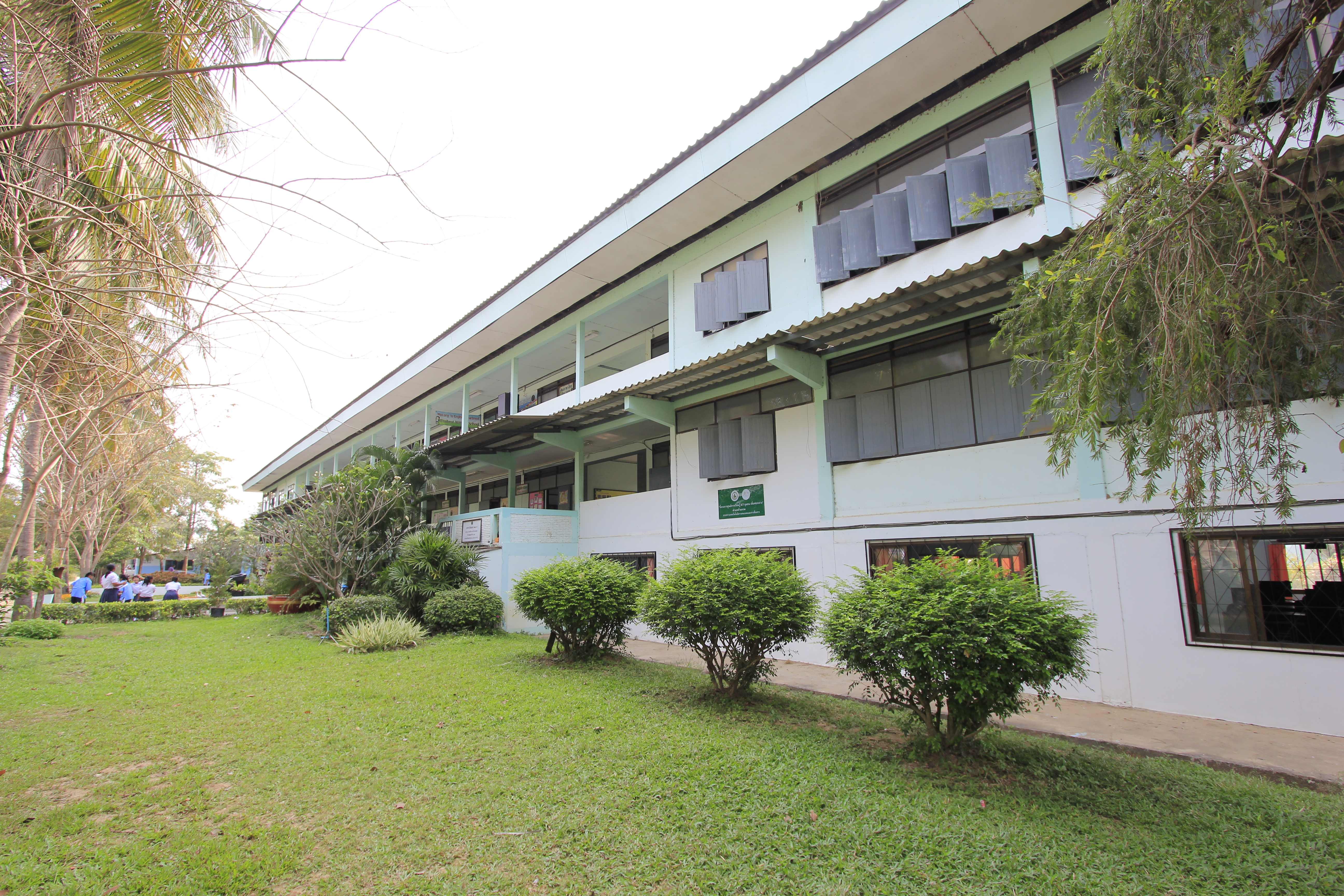 อาคารตาลคู่วชิระ อาคารเรียน แบบ 216 ค โรงเรียนห้วยกรดวิทยา